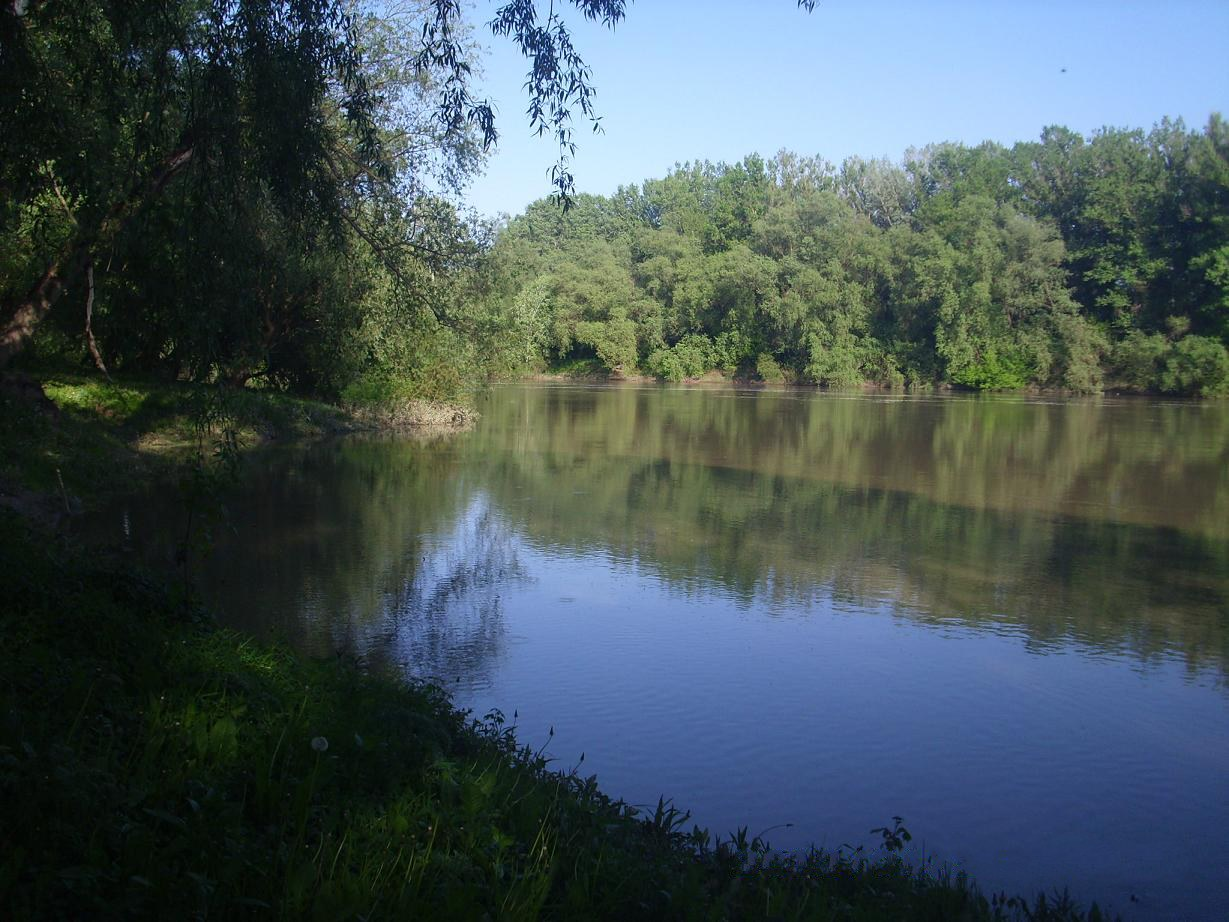 Tisza Tivadarnál